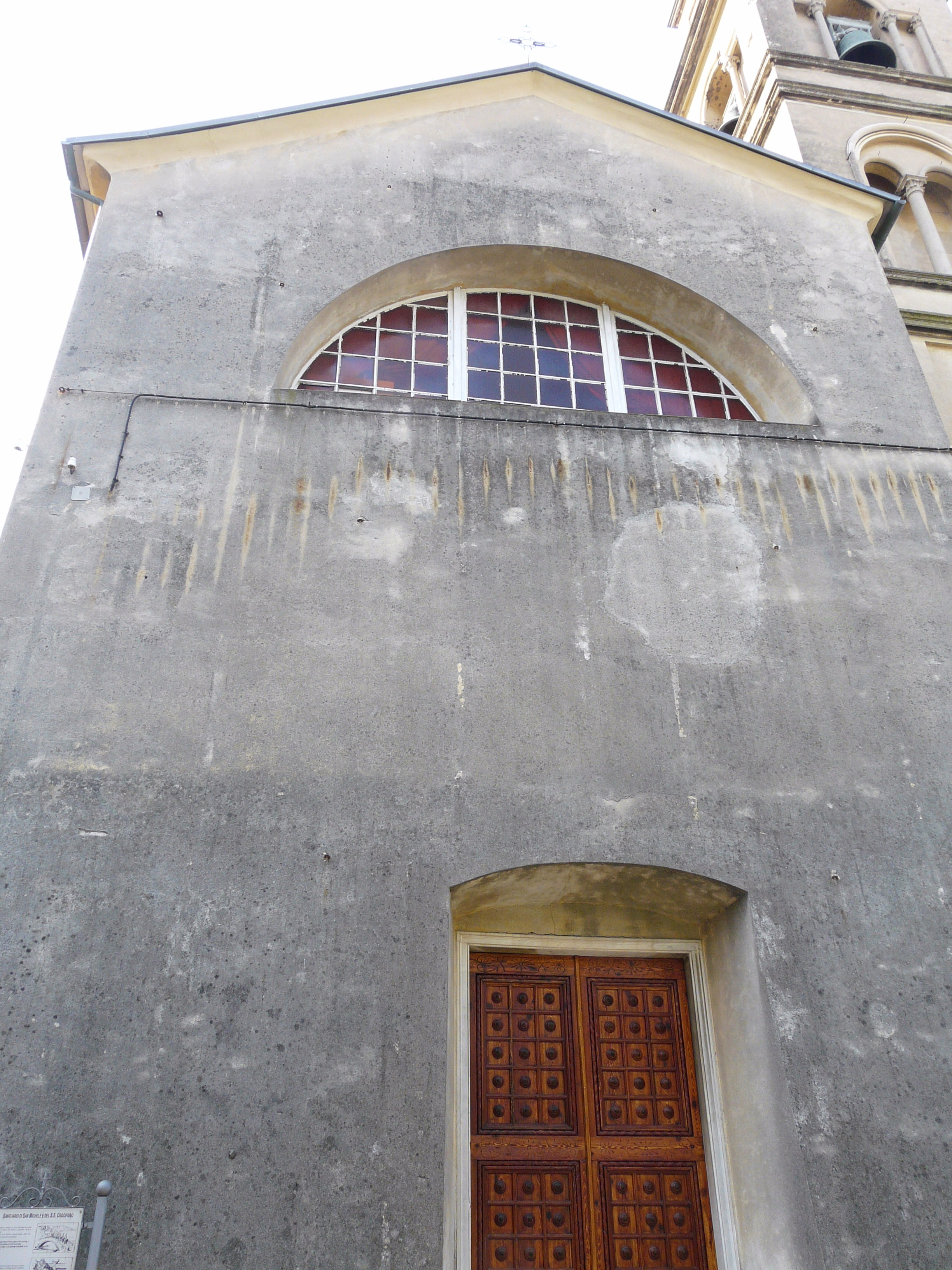 Santuario di San Michele e del Santo Crocifisso, Recco, Liguria, Italia